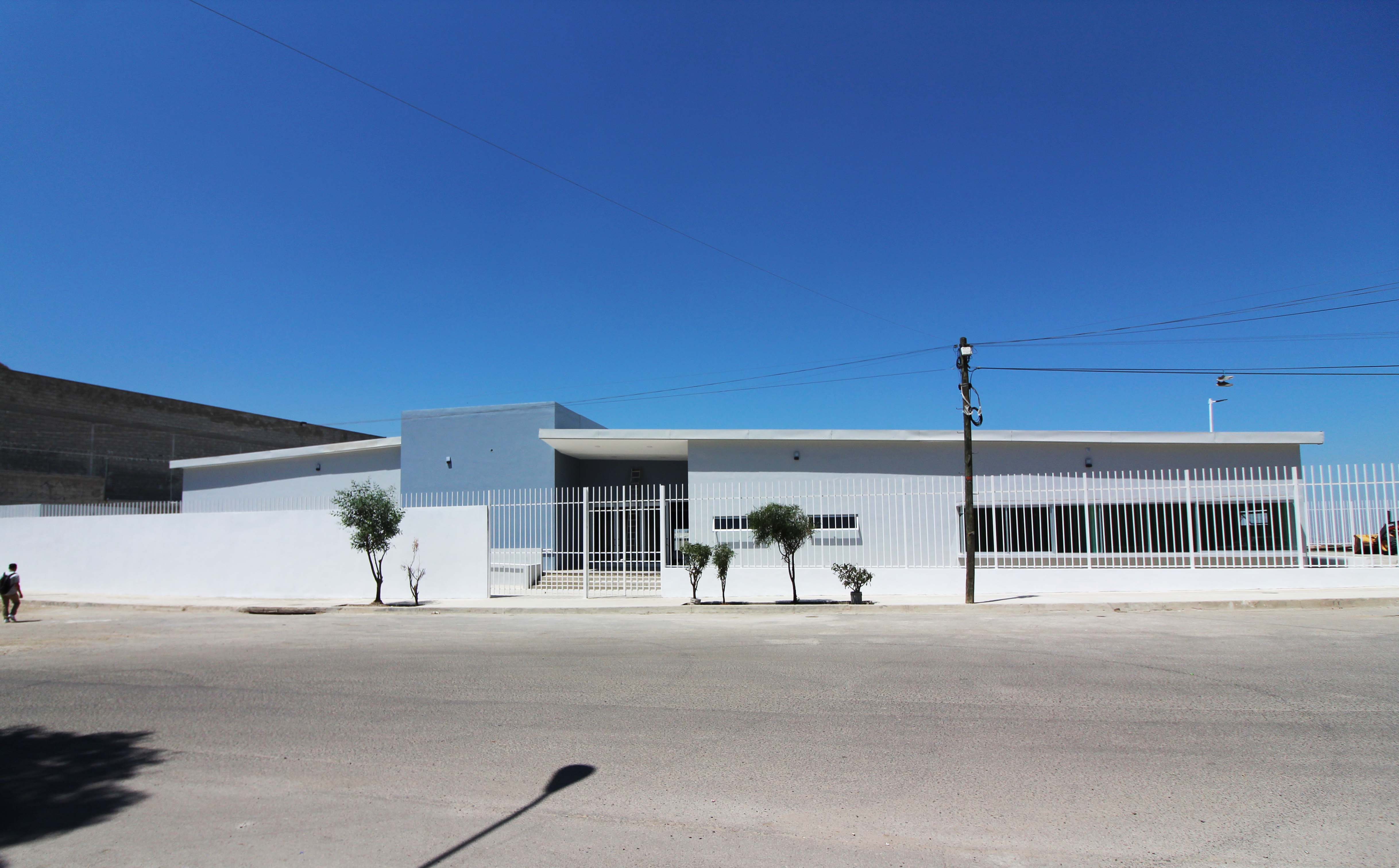 Casa de la cultura de la delegación Cerro Colorado en Tijuana